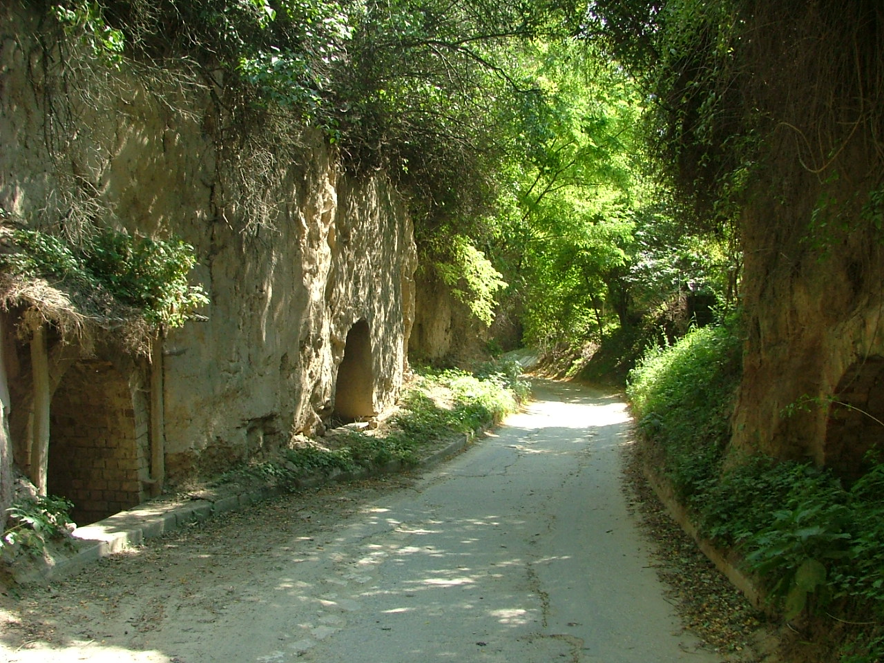 A „Szurdik” Nyúl községben. Létrejötte: bevágás (eső áztatta) A löszös földbe. A Sokorói-dombság egyik földtörténeti érdekessége.